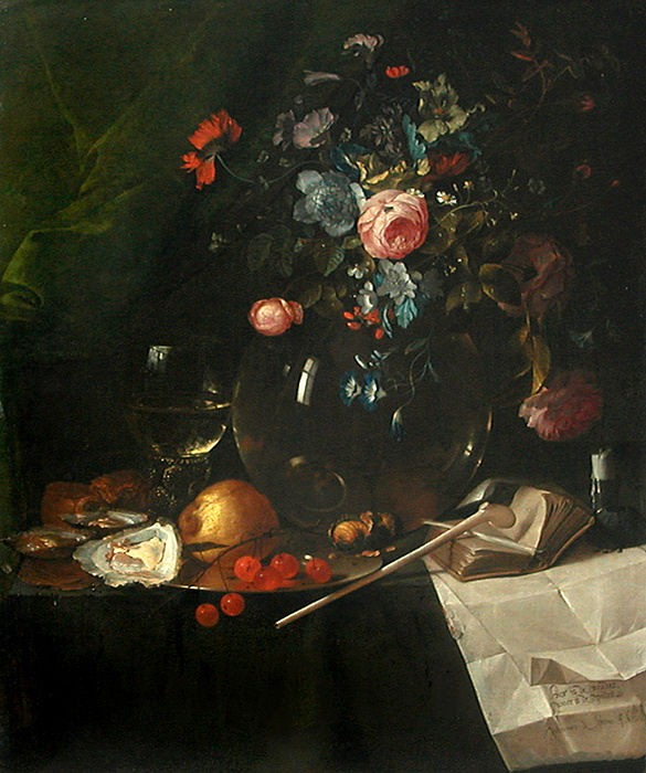 Nature morte aux fleurs